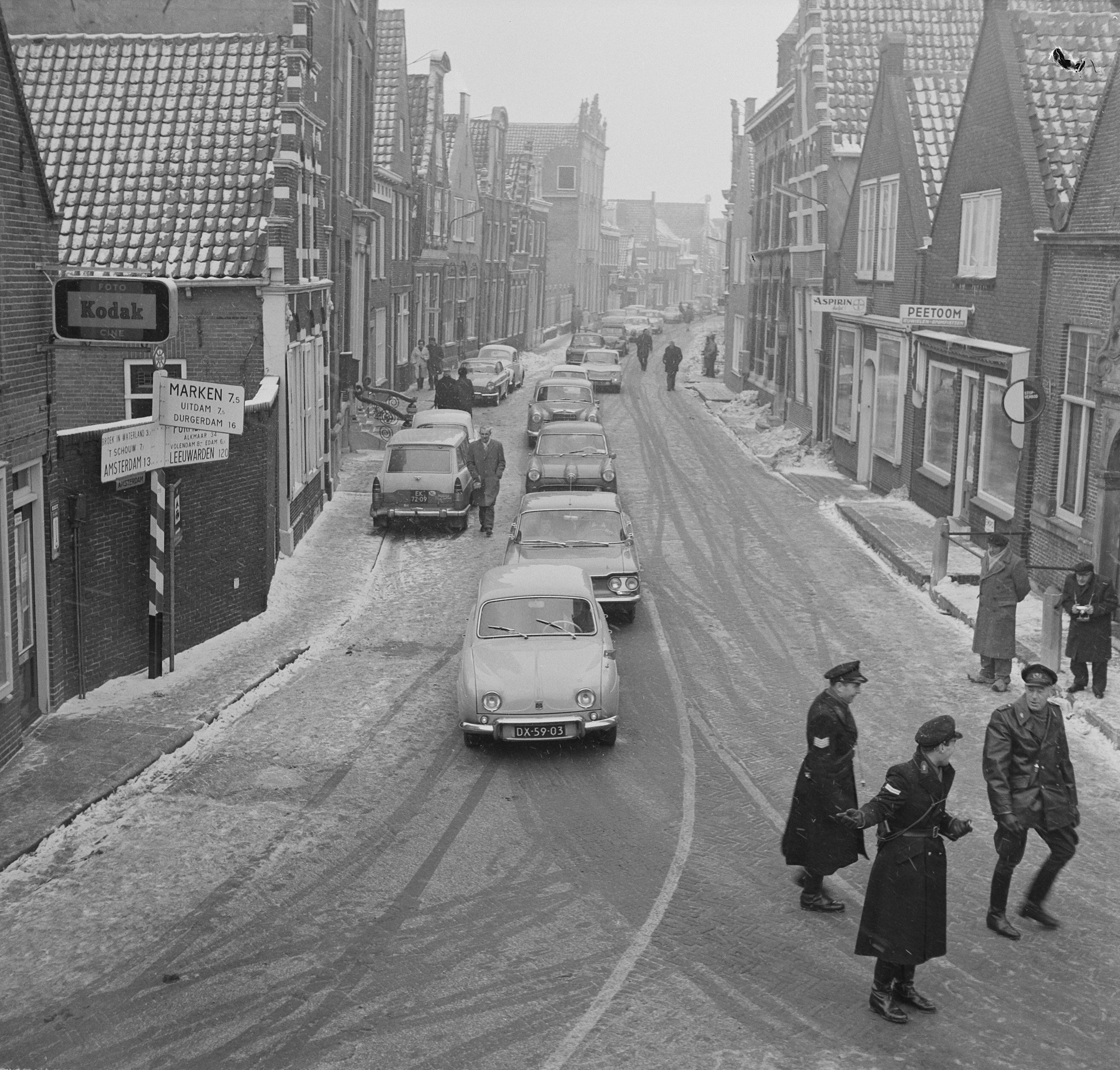 Collectie / Archief : Fotocollectie Anefo Reportage / Serie : [ onbekend ] Beschrijving : Monnickendam, drukte in de straten Datum : 12 januari 1963 Locatie : Monnickendam Trefwoorden : verkeersdrukte Fotograaf : Nijs, Jac. de / Anefo Auteursrechthebbende : Nationaal Archief Materiaalsoort : Negatief (zwart/wit) Nummer archiefinventaris : bekijk toegang 2.24.01.03 Bestanddeelnummer : 914-7081